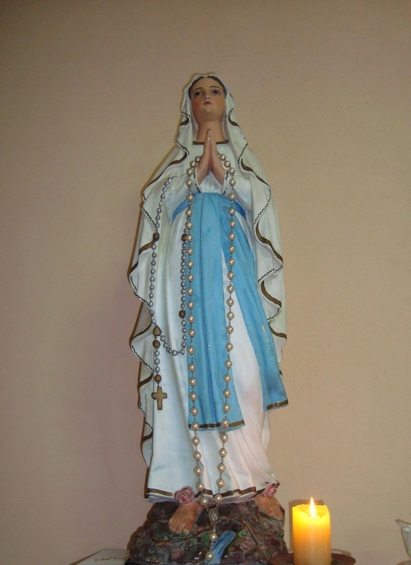 Imagem Histórica de Nossa Senhora de Lourdes, Porto Alegre, Brasil